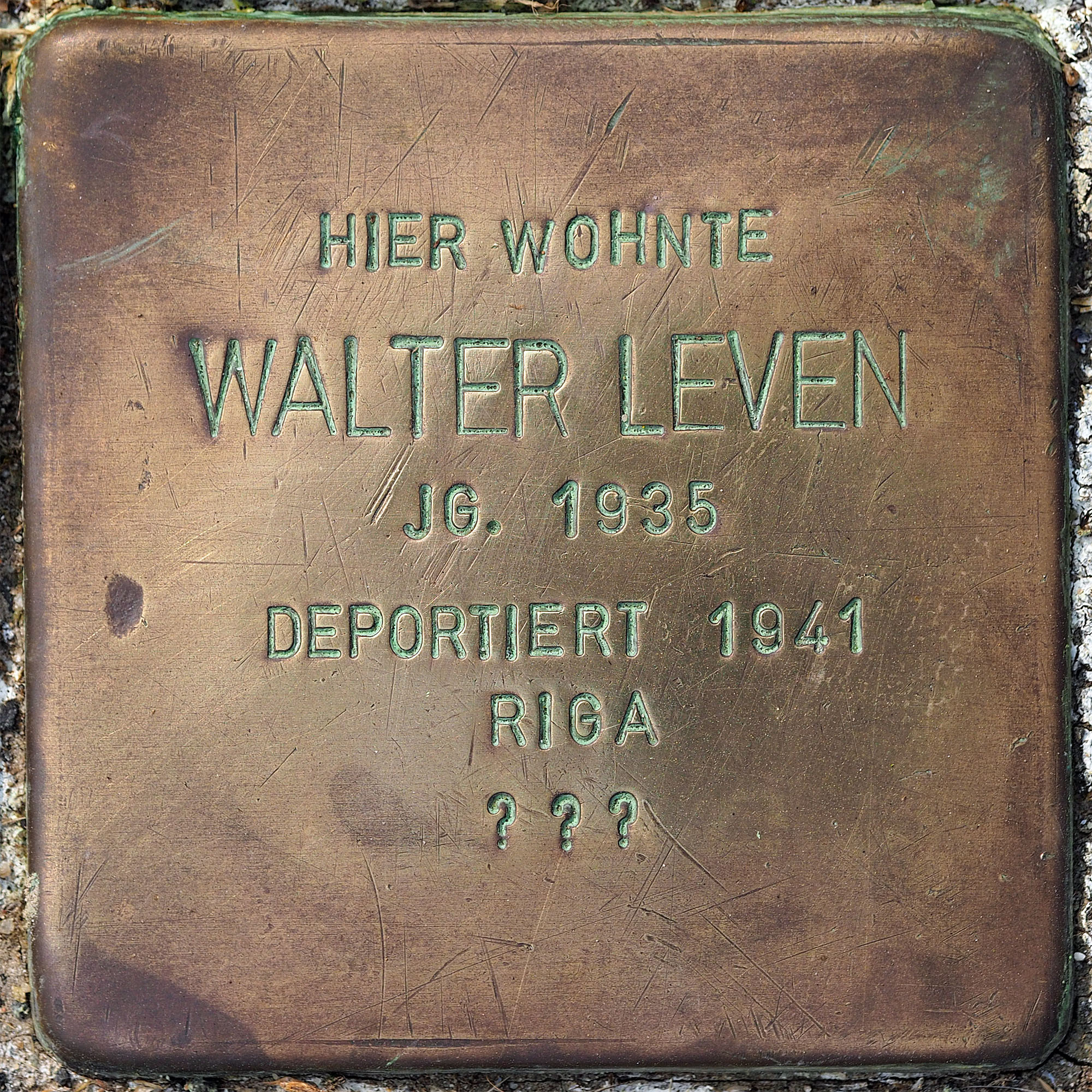 Stolpersteine MG: Leven, Walter